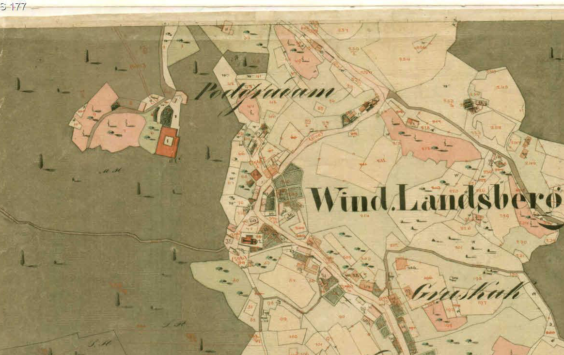 Franciscejski kataster za Štajersko, 1823-1869